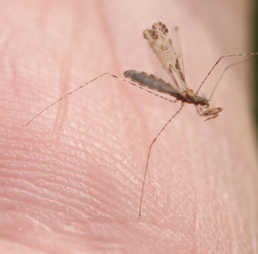 Empicoris culiciformis, 5mm lang, am 15.04.2018 südlich Mannheim